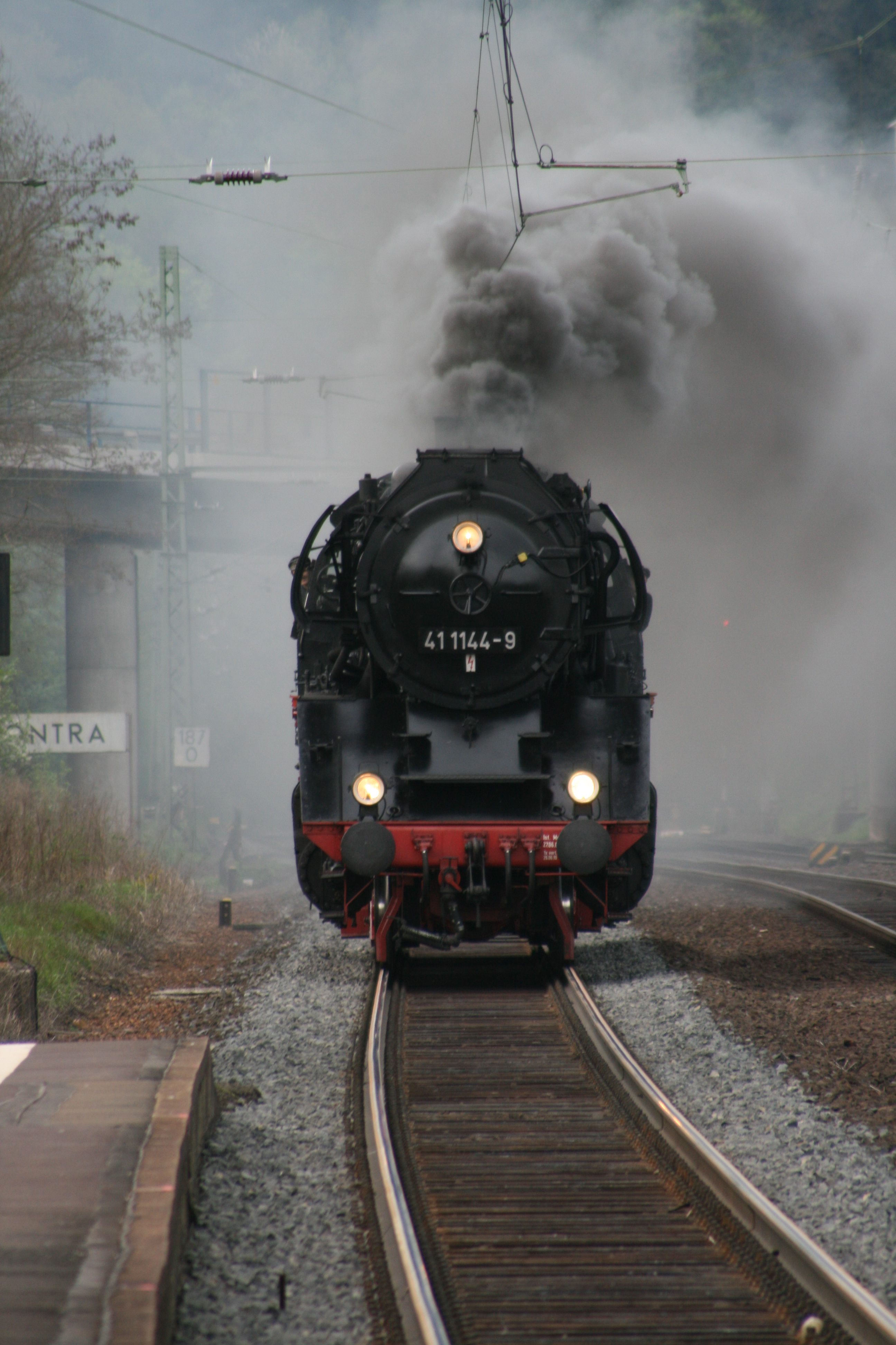 Eine ReKo 41 der ehemaligen Reichsbahn (Ost) im bahnhof von Sontra.